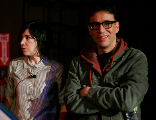 Photo By Kent Derek